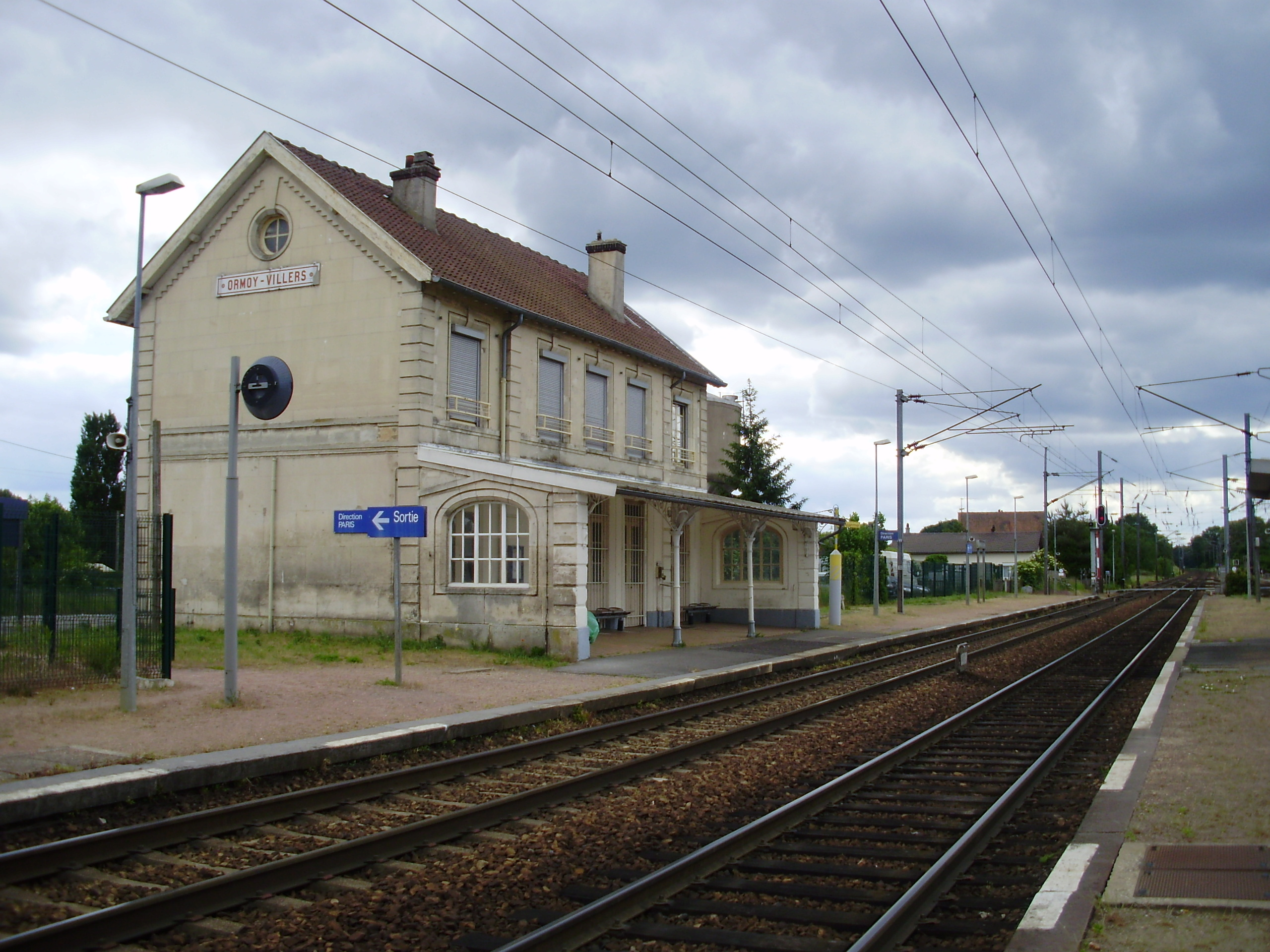 Gare d'Ormoy-Villers, Oise, France : bâtiment voyageurs avec abri et quais en regardant vers Paris